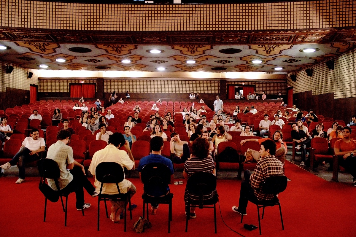 Debate sobre Cinema e Direitos Urbanos no Cinema São Luiz - Recife, Pernambuco, Brasil.